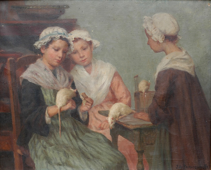 Peinture de Jean de FRANCQUEVILLE